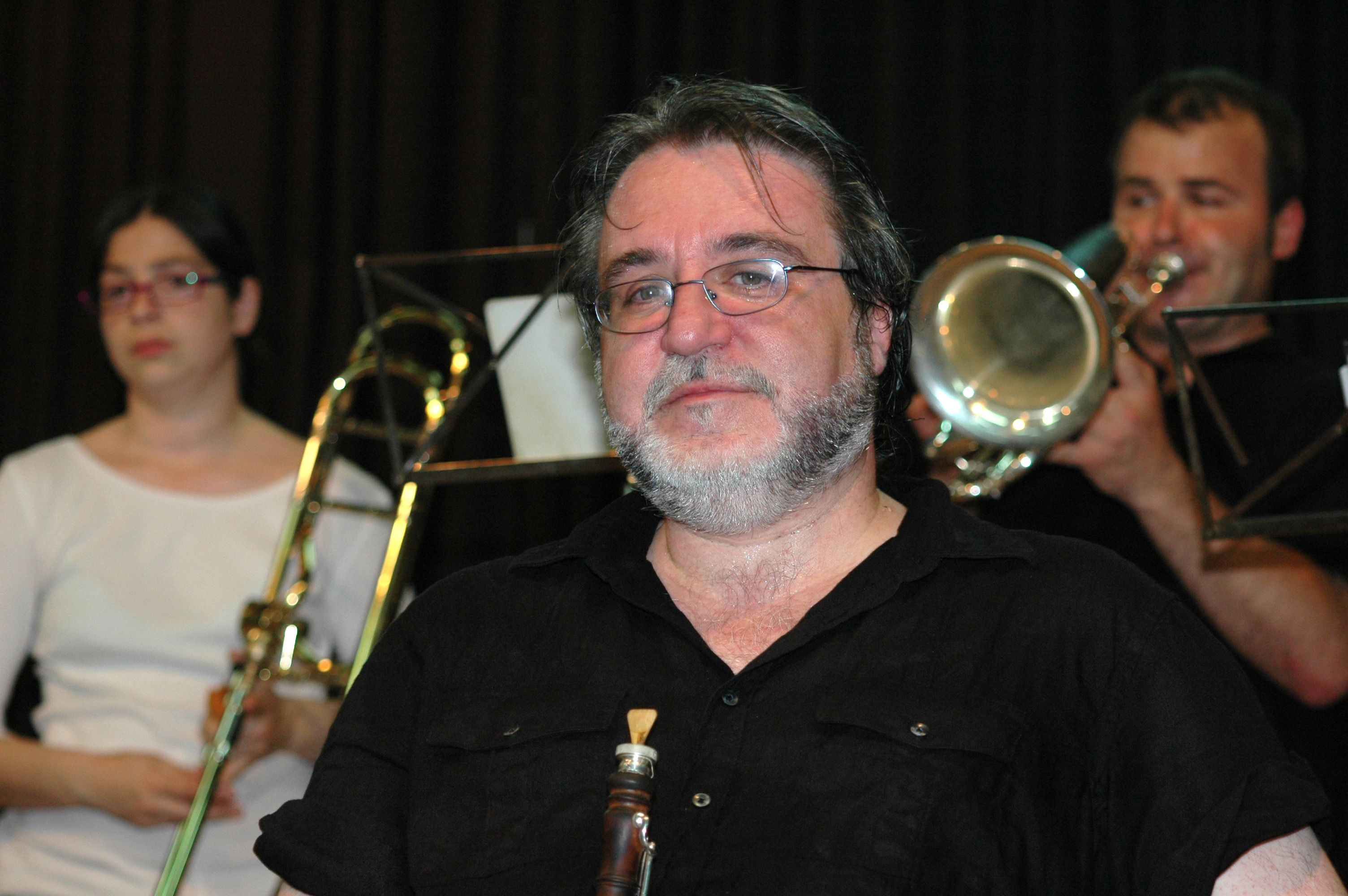 David Estañol i Martells